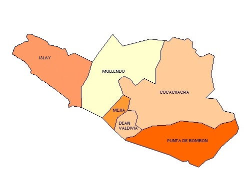 Mapa de la Provincia de Islay con sus Distritos